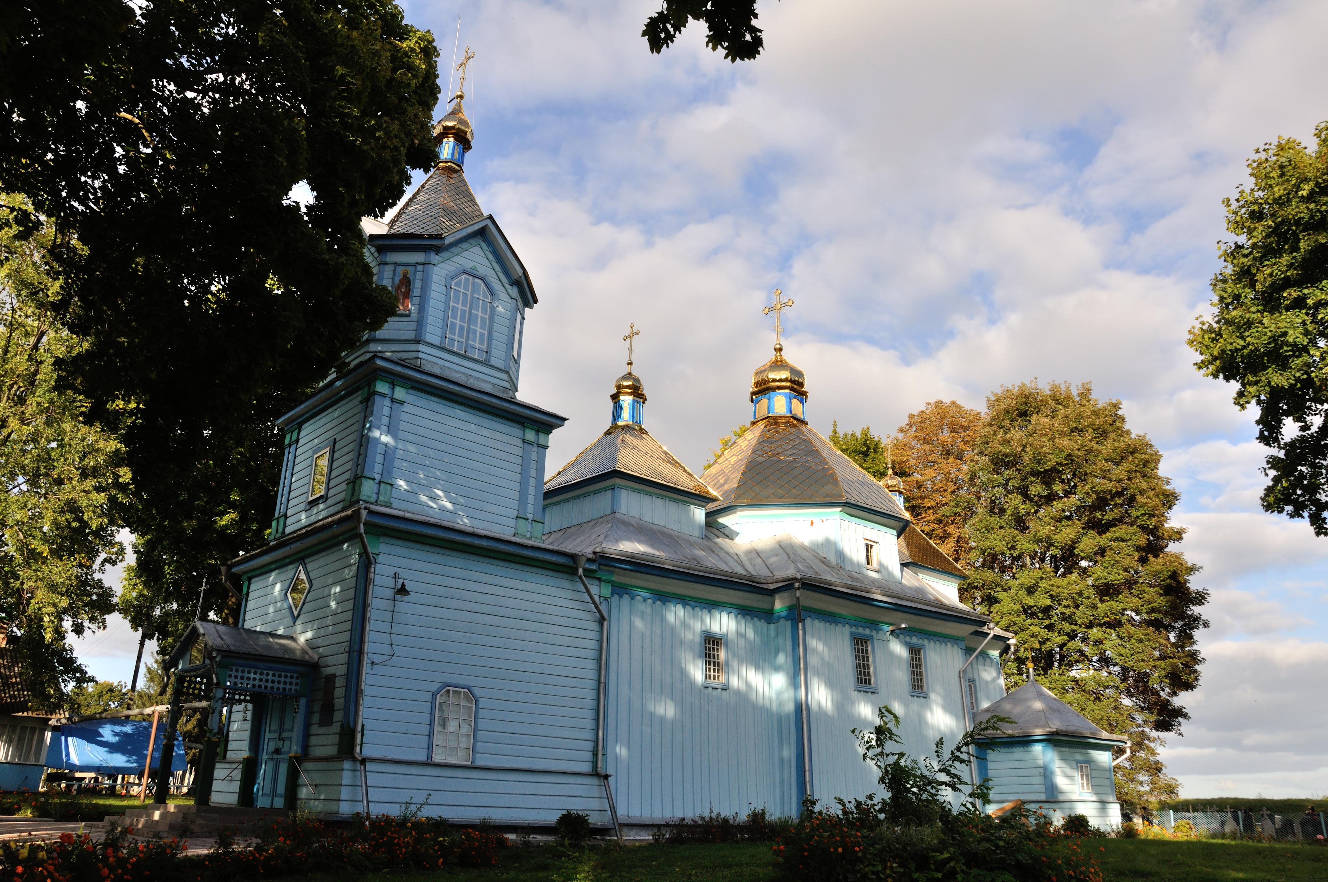 Церква Св.Юрія (дер.), с.Грабів